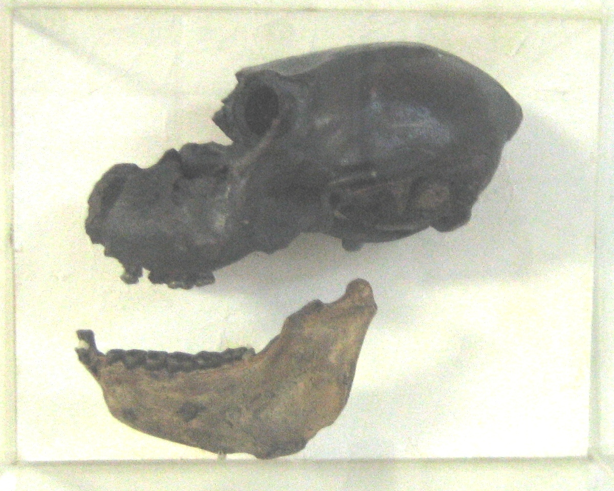 Paralouatta marianae skull